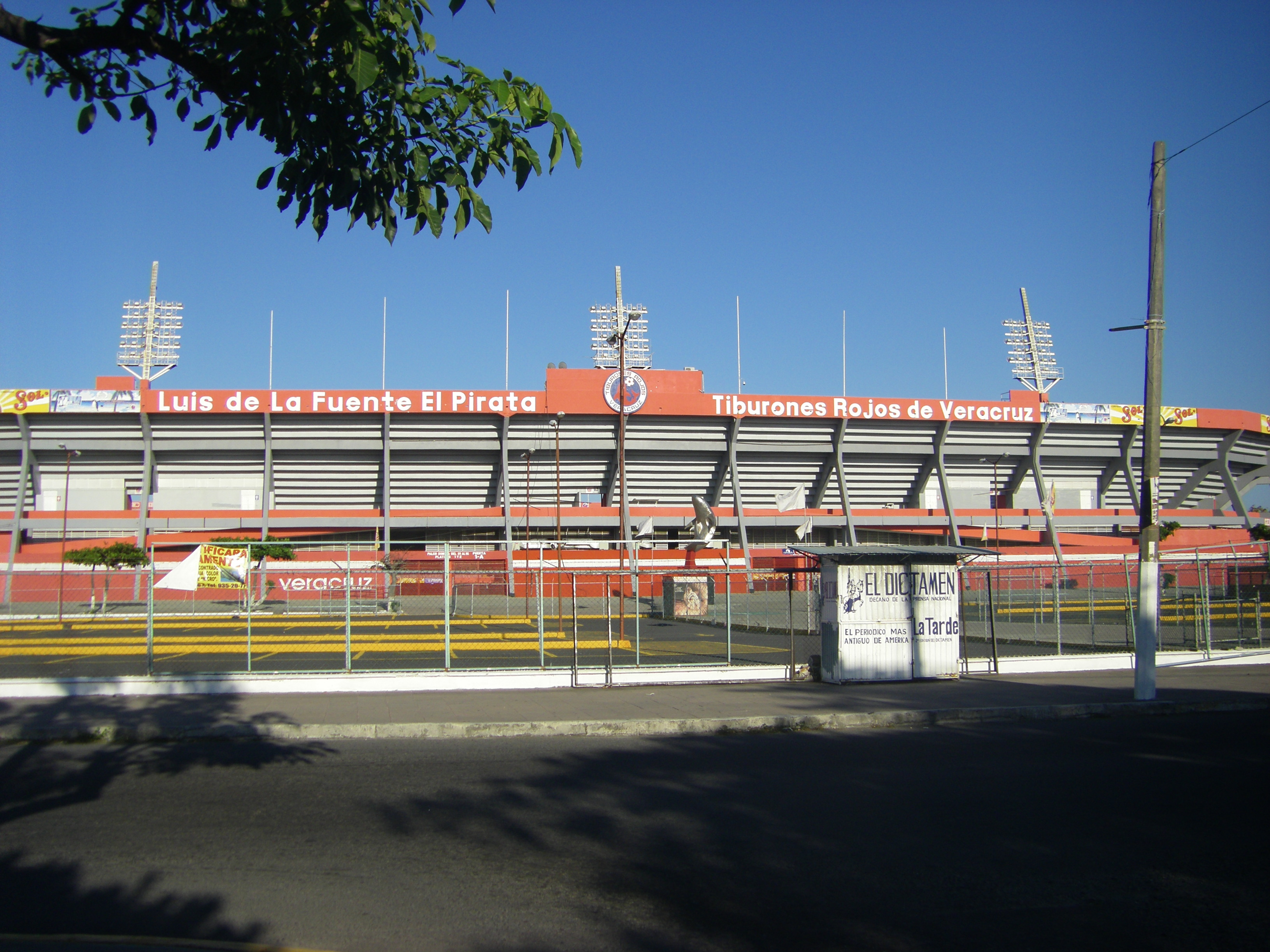 Fußballstadion in Veracruz, Mexiko